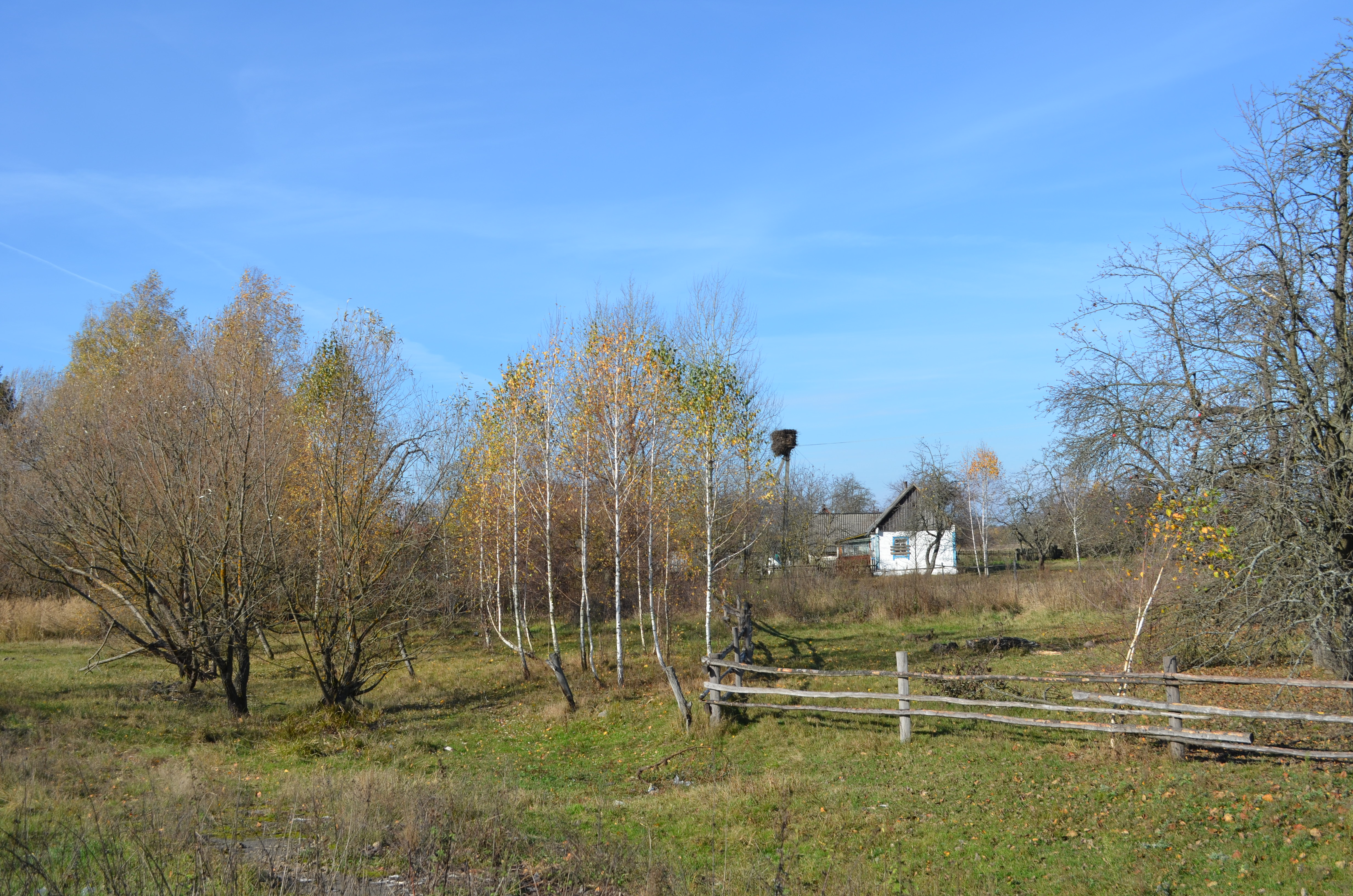 с. Жупанівка